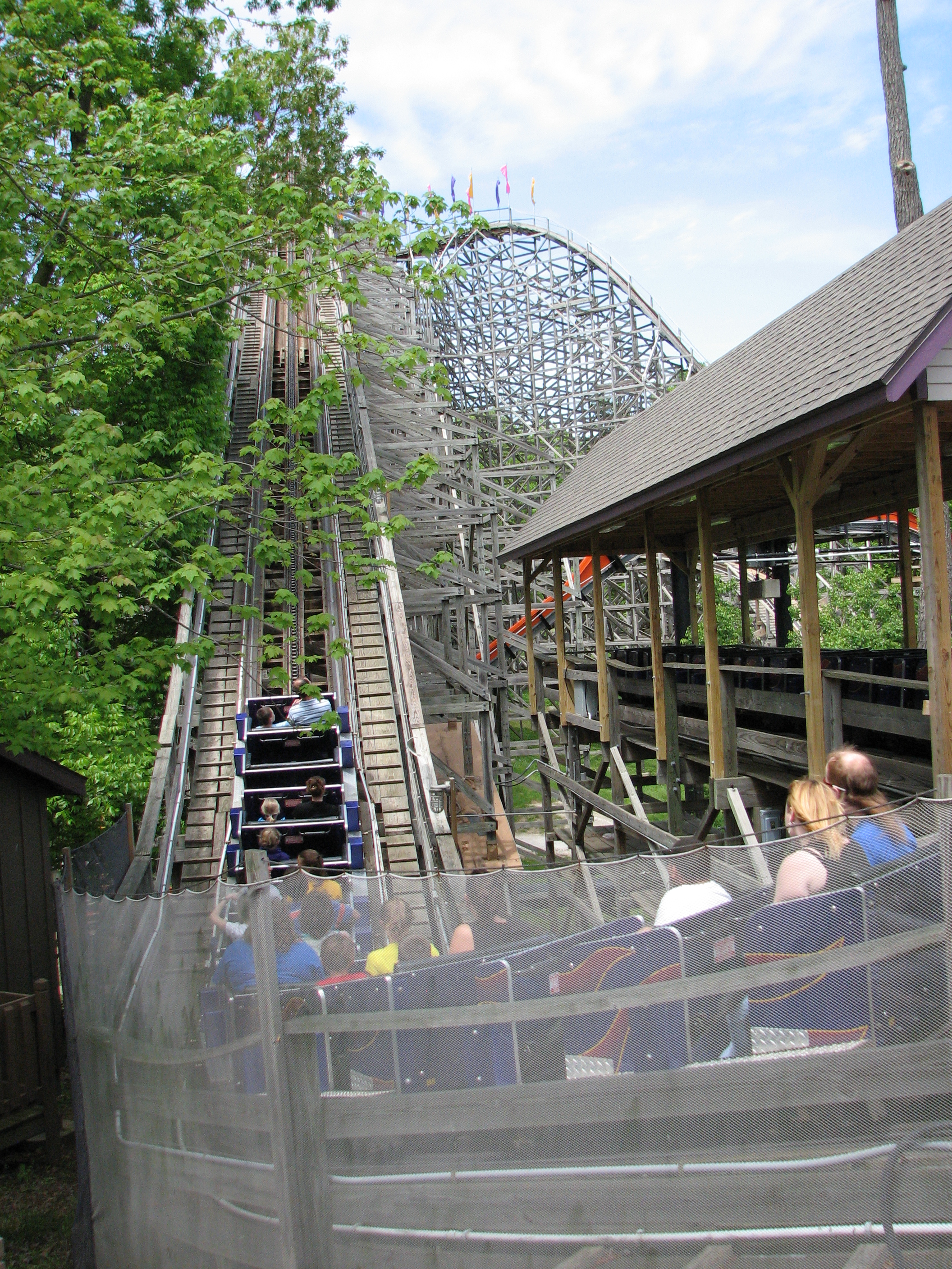 Die Holzachterbahn The Legend im Themenpark Holiday World